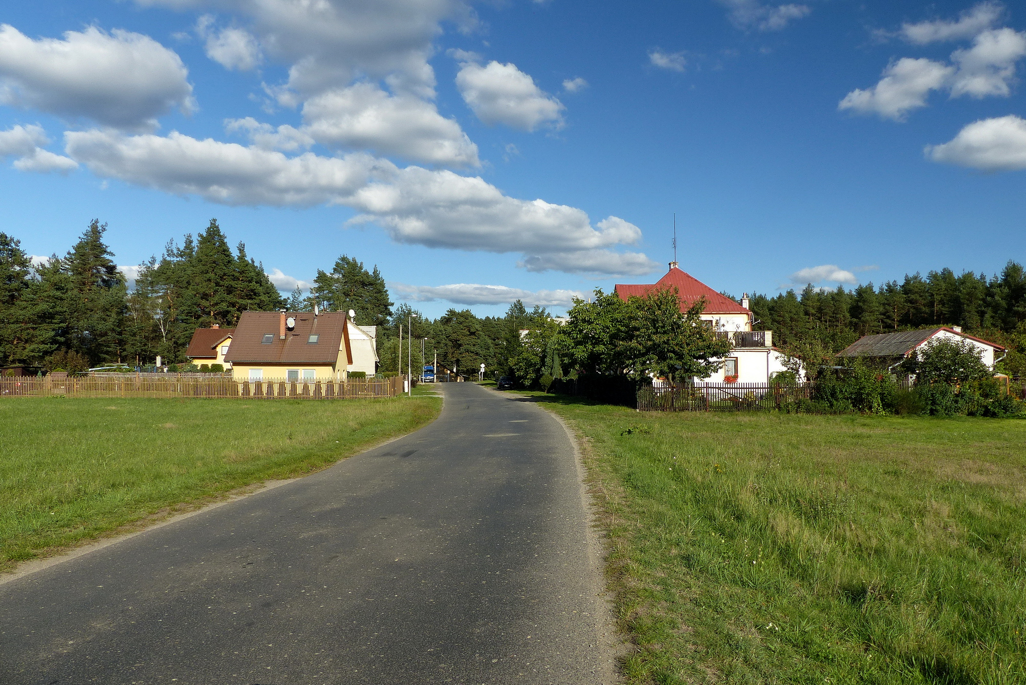 Východní část Ploužnice